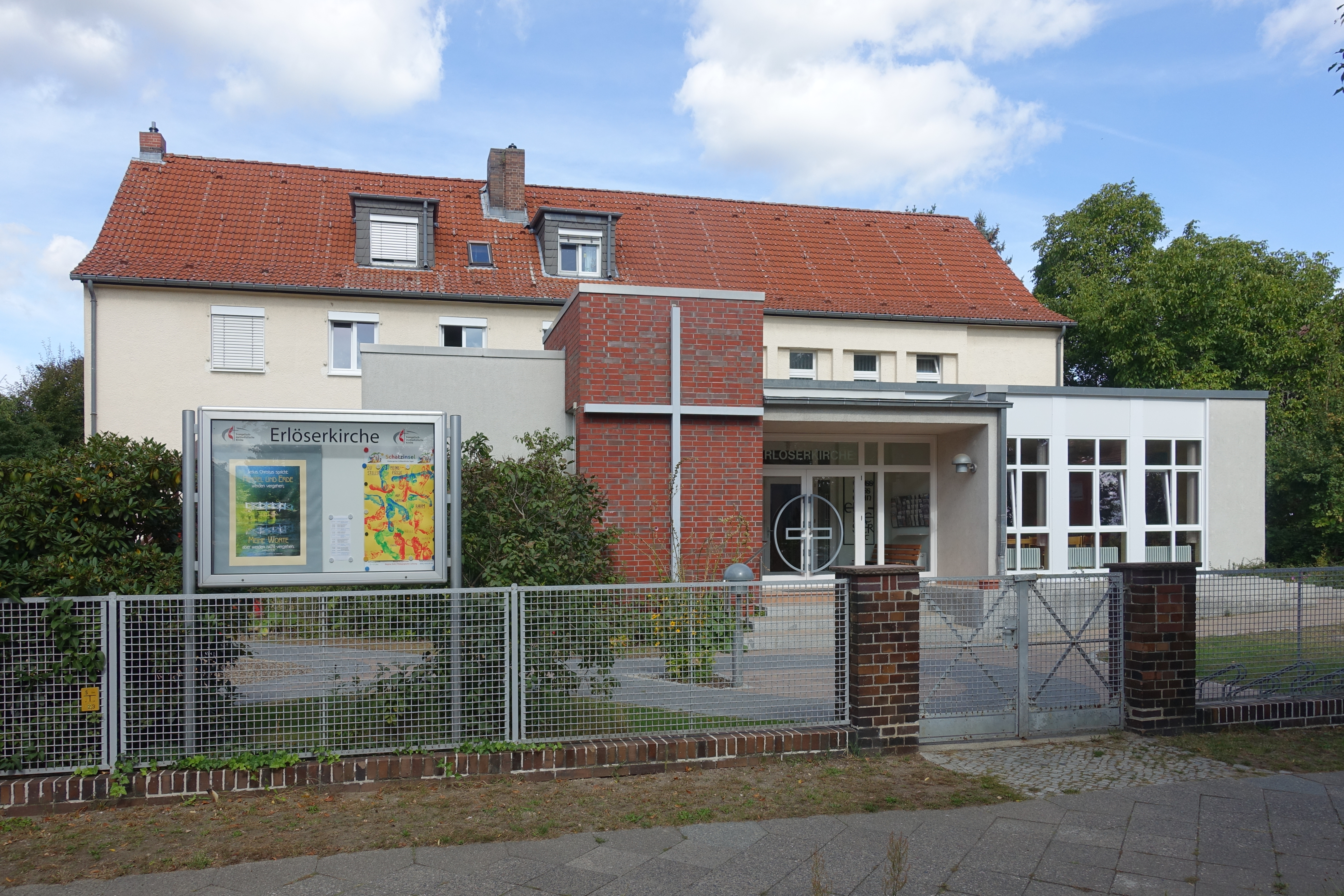 Blick auf die Kirche von der Straße